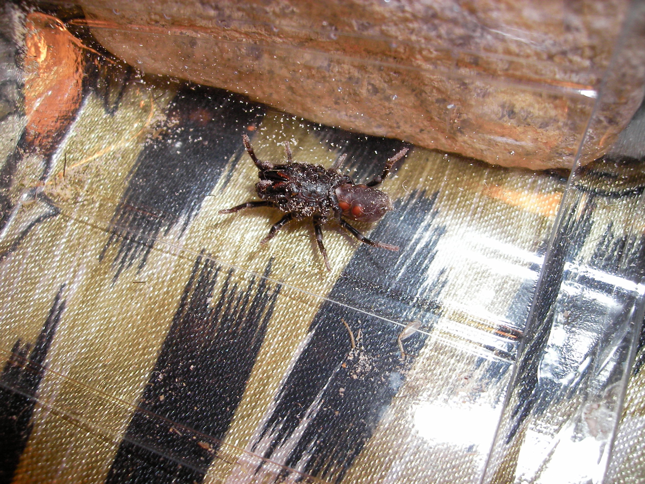 Atypus affinis, Wohnungsfund aus Freudenberg (Postleitzahl 57258), Südost-NRW